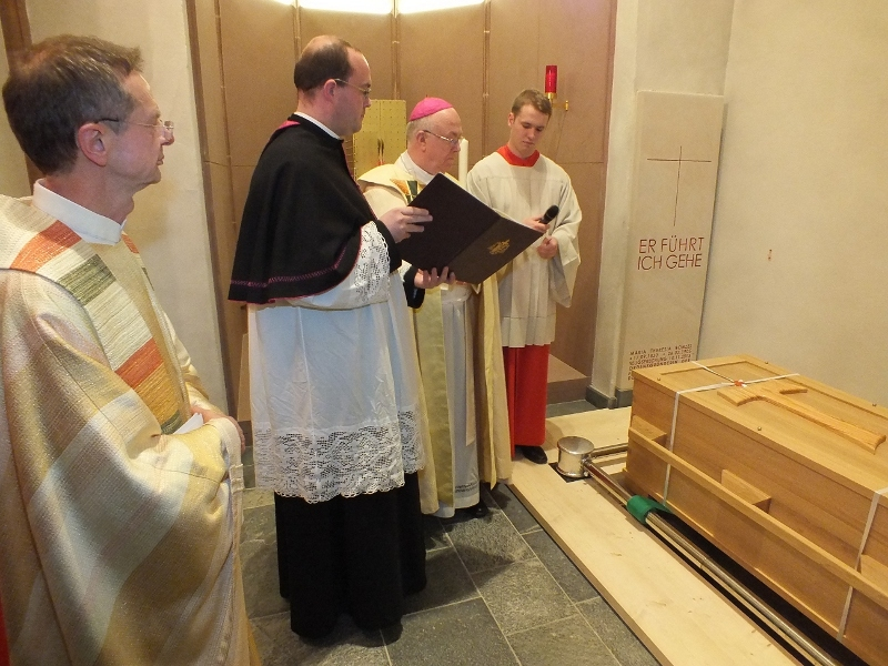 Segnung des Sarges von Maria Theresia Bonzel anlässlich der Umbettung am 12. 11. 2013 in der Olper St.-Martinus-Pfarrkirche.